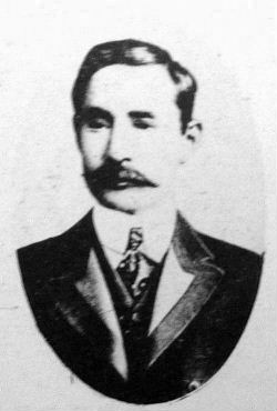 a Japanese man 夏目漱石 (Soseki Natsume)